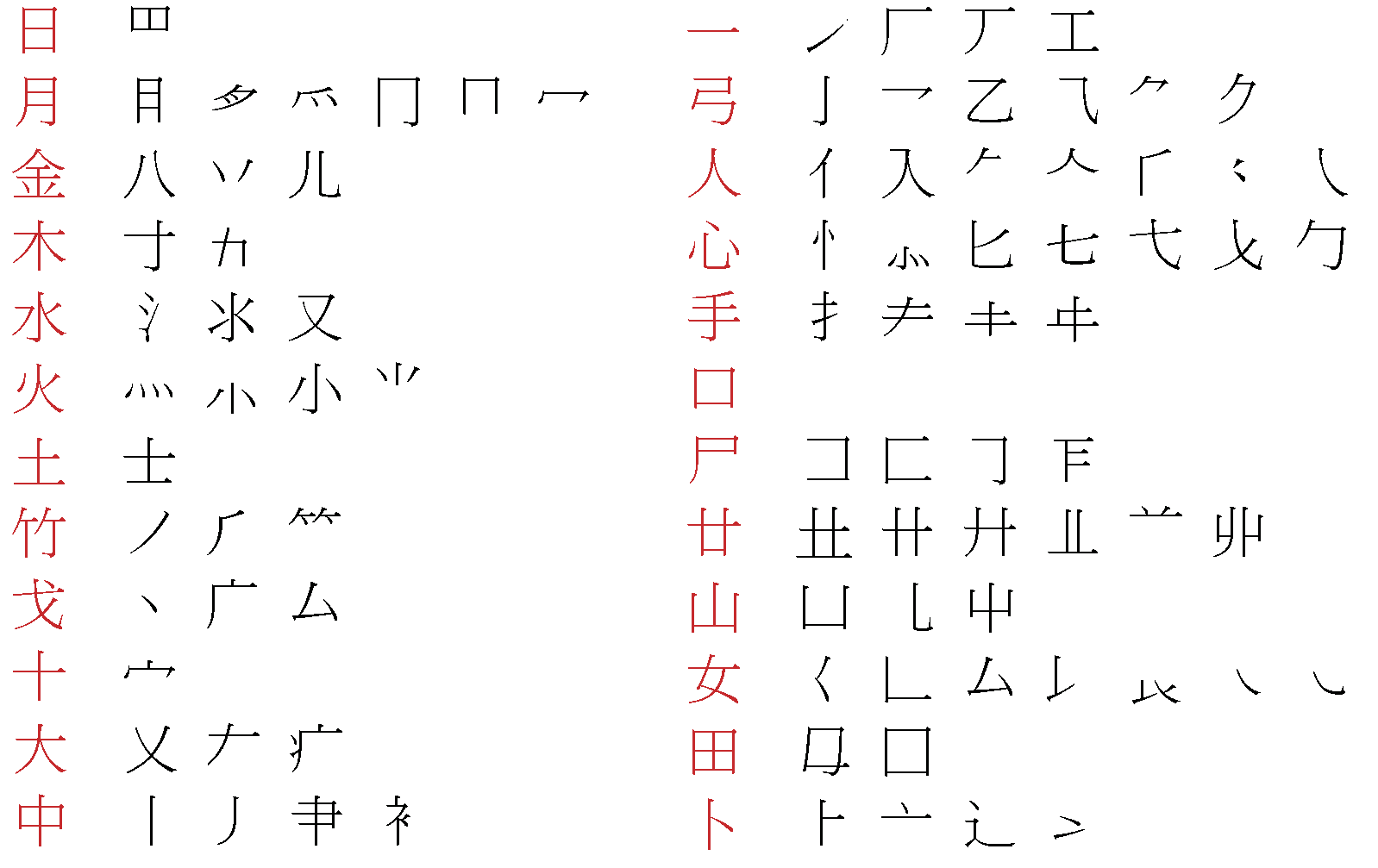 Liste von weiteren Zeichenelementen im Cangjie-Eingabeverfahren (Eingabesystem für chinesische Schriftzeichen)